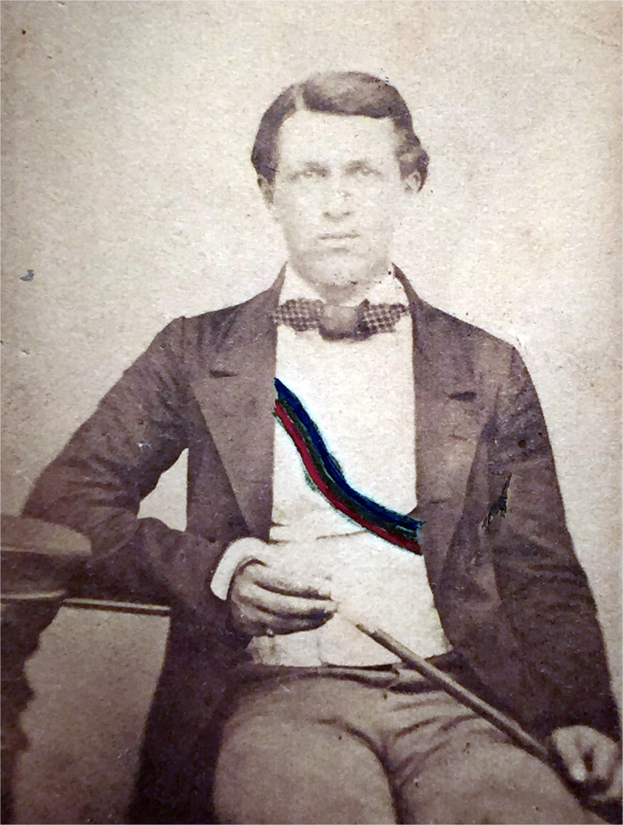 Porträtfotografie von Julius Upmann als Corpsstudent in Leipzig